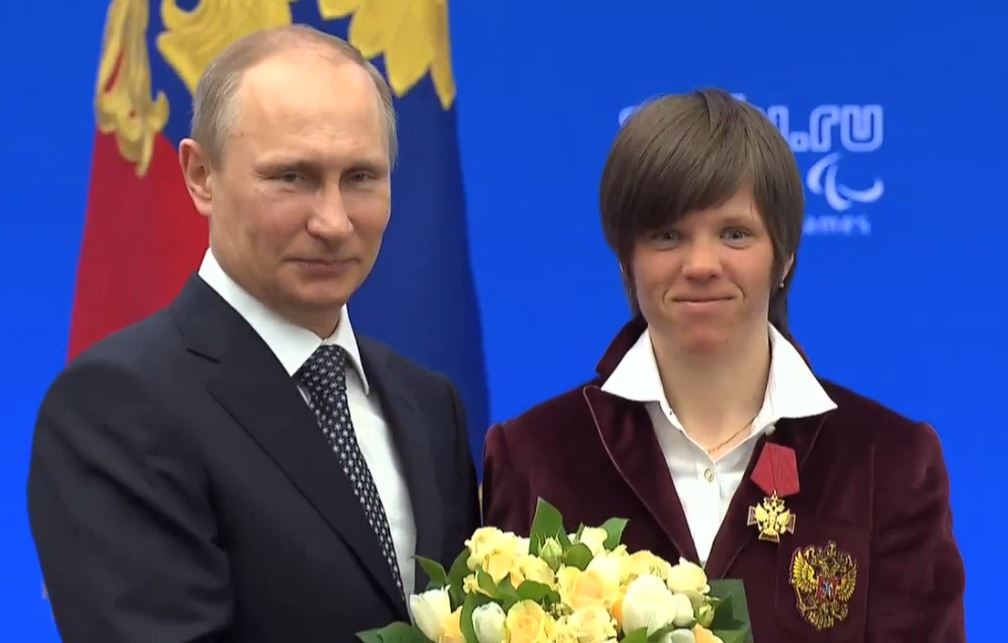 Трёхкратная паралимпийская чемпионка и серебряный призёр Паралимпийских игр в лыжных гонках Елена Ремизова.